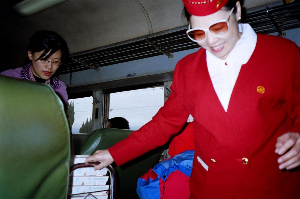 台灣鐵道網226山海線之旅，臺灣鐵路管理局普通車專列，臺灣鐵路管理局餐旅服務總所女性服務員（右）發便當。